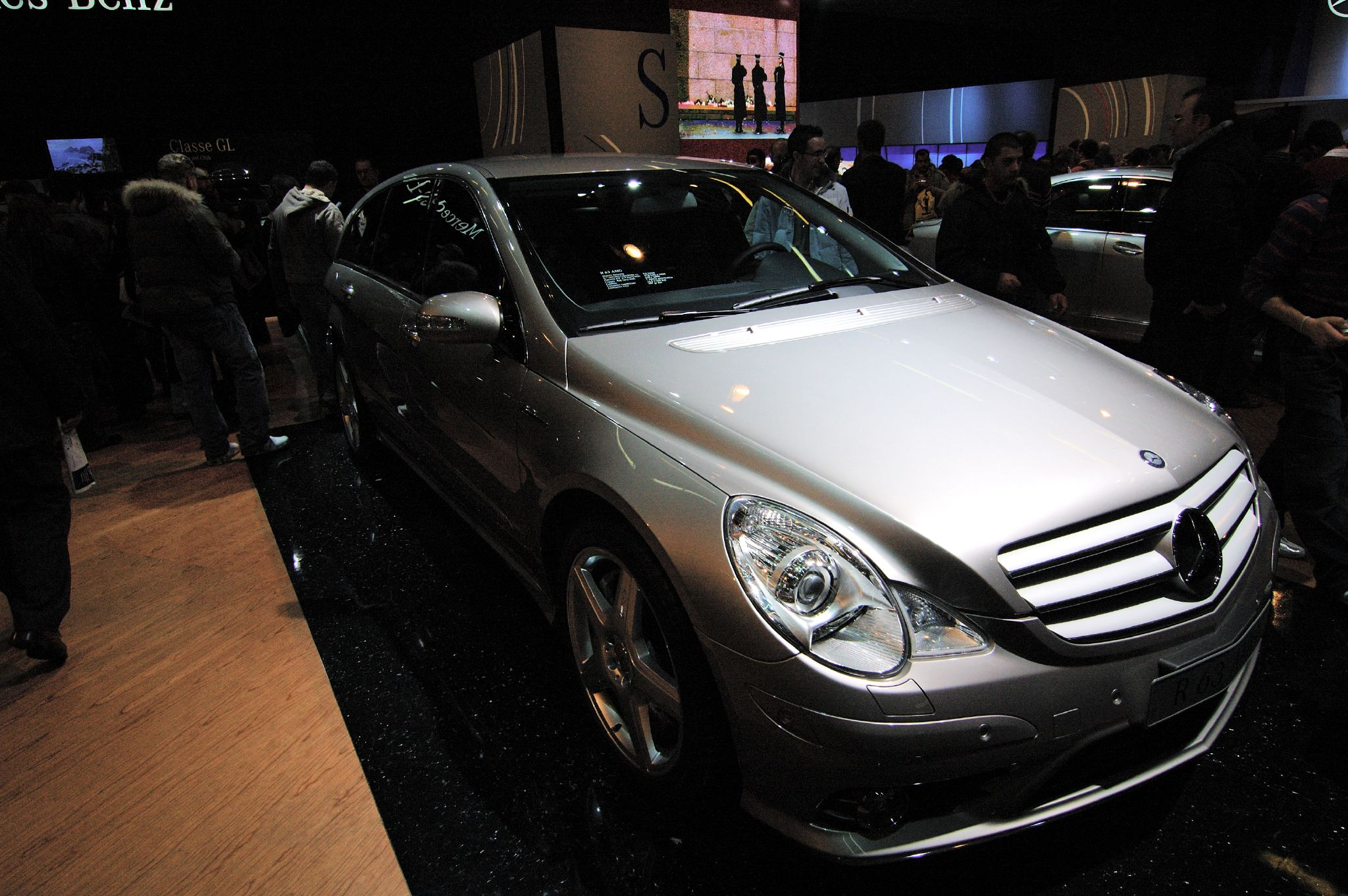 Mercedes